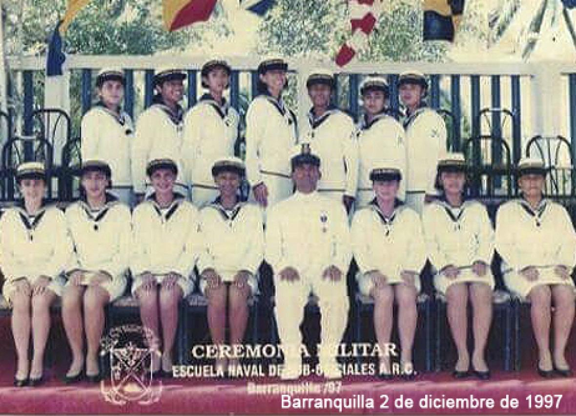 primeras mujeres